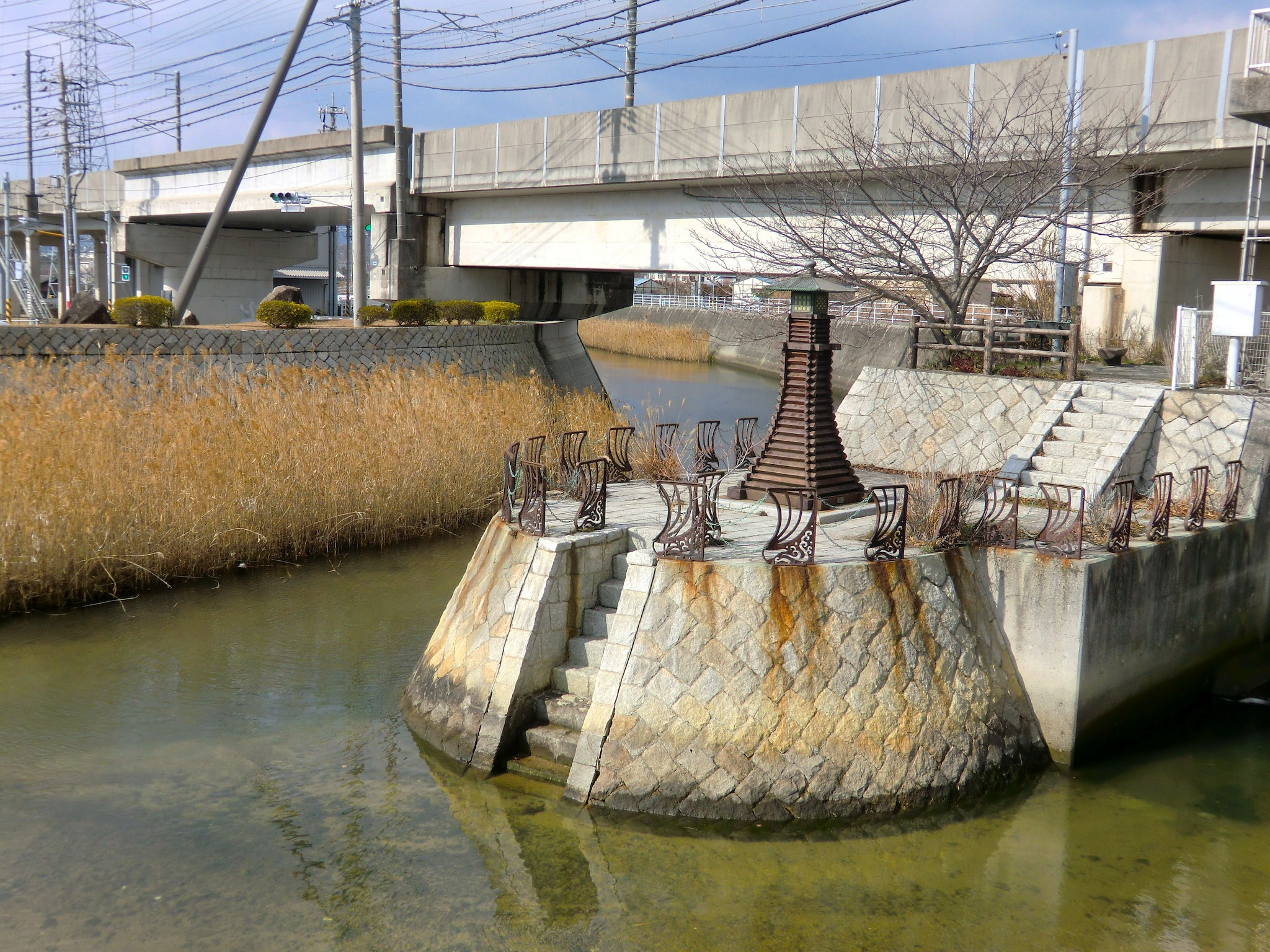 周防国衙跡（船所・浜ノ宮）の灯籠風灯台モニュメント（山口県防府市）